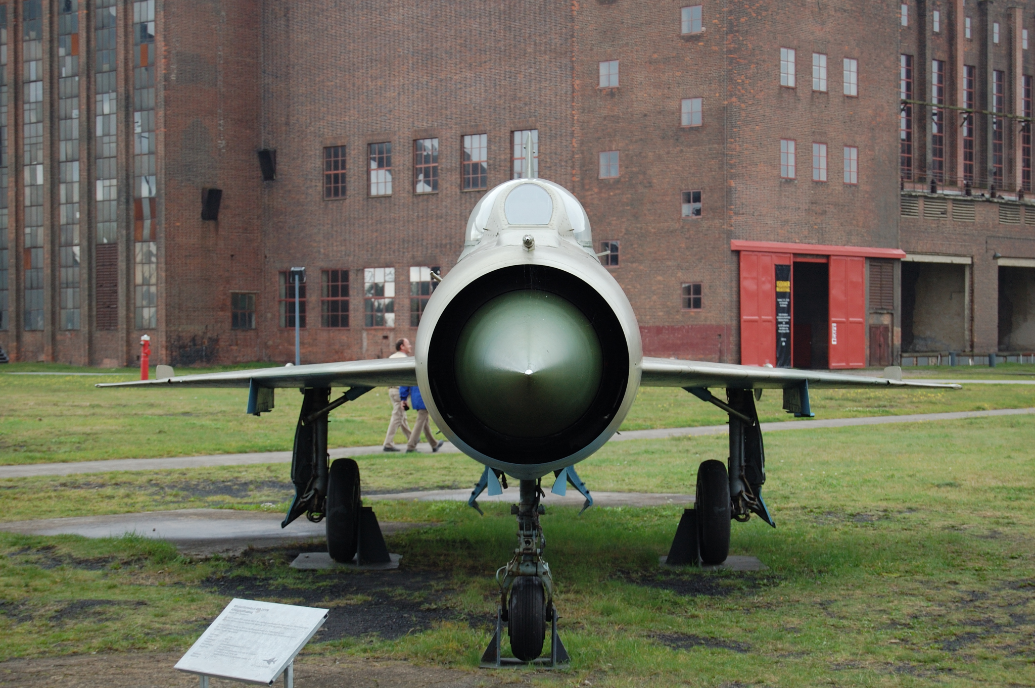 Frontansicht MiG 21PF "Fishbed" der NVA in Peenemünde